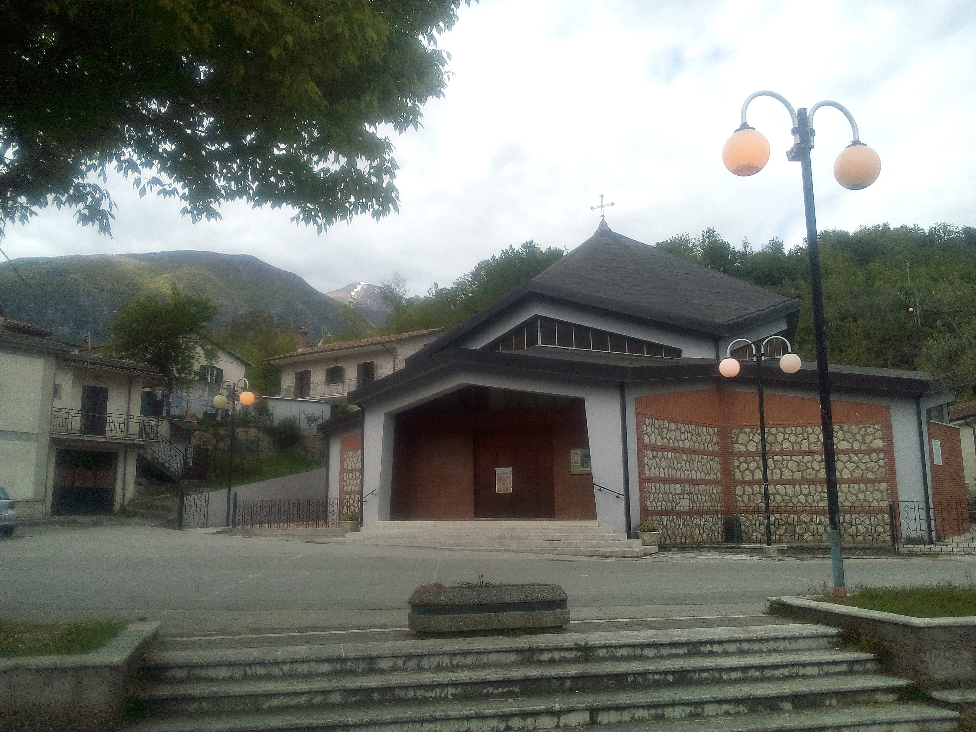 Chiesa della Madonna della Stella a Grancia (Abruzzo)